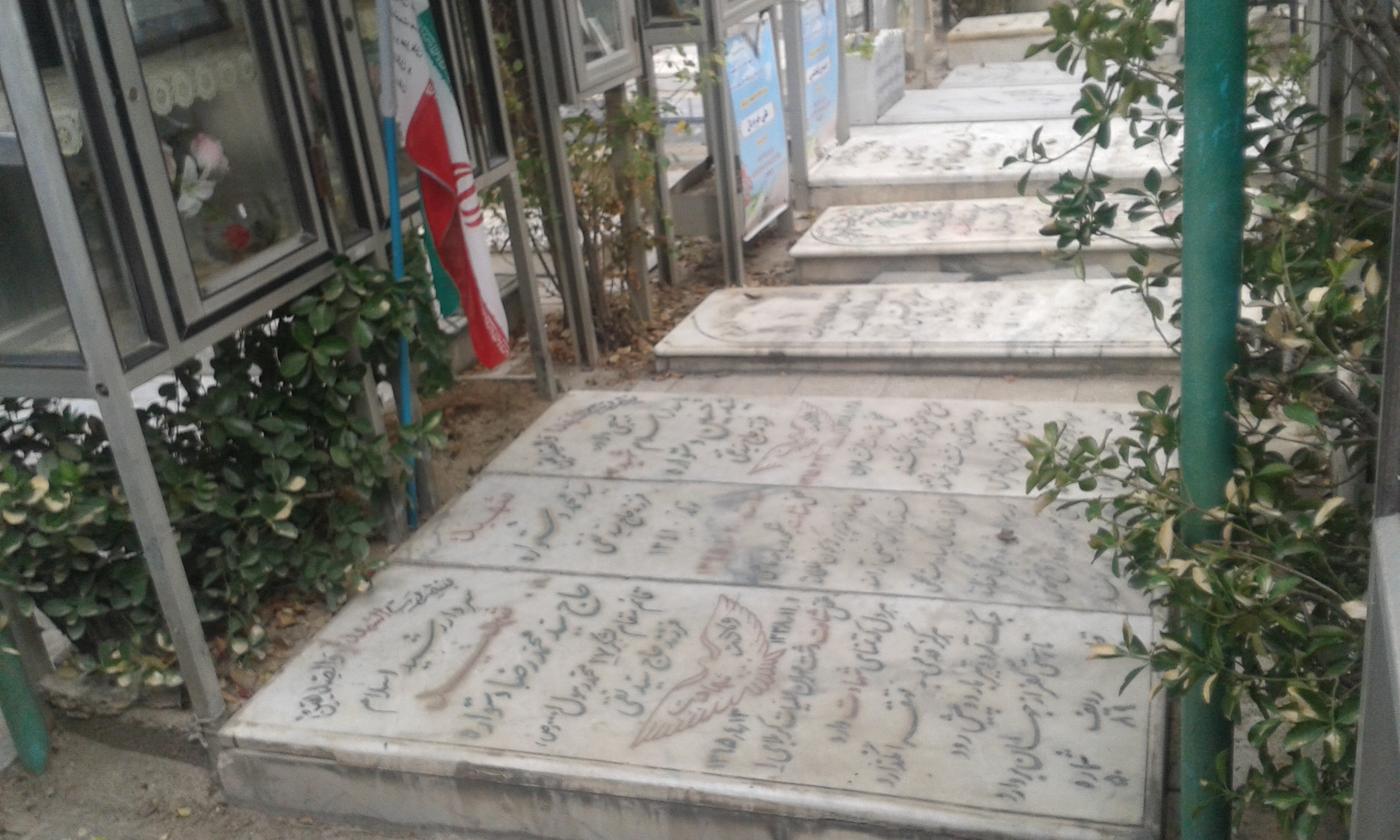 قبر شهیدان دستواره